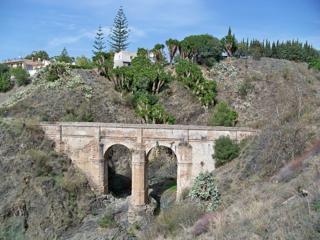 Puente del Acueducto de San Telmo sobre el arroyo Don Ventura, a la altura del paraje conocido como Molinos de San Telmo, visto desde el sur.